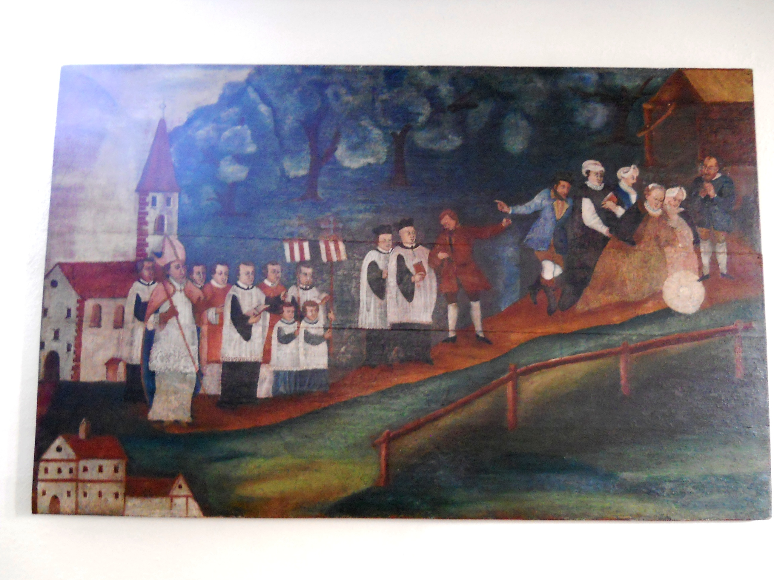 Rauenzell, Ortsteil von Herrieden im Landkreis Ansbach (Bayern), Kath. Pfarrkirche Mariä Heimsuchung, Bildtafel (18, Jahrhundert) mit der Gründungslegende der ehem. Wallfahrtskirche St. Salvator